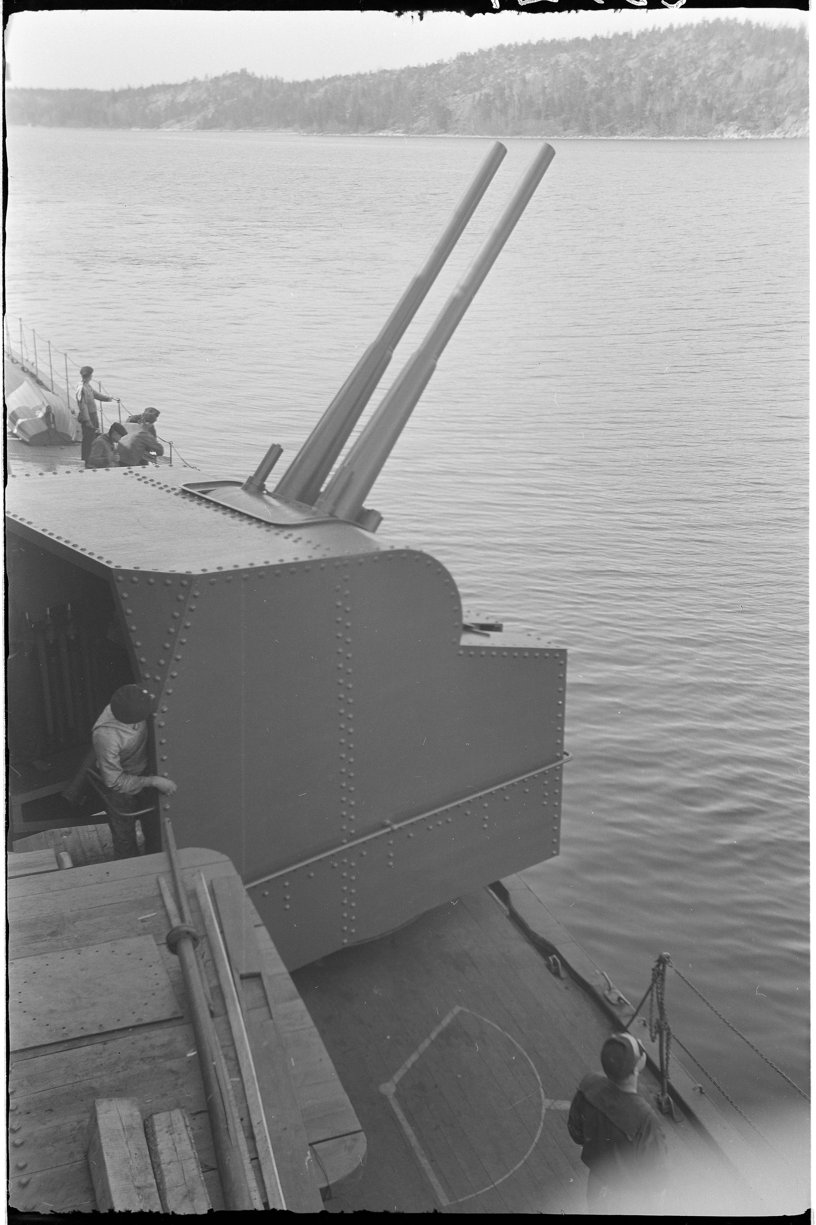 105 m/m Boforsin raskasilmatorjuntatykki suunnataan lentokonetta kohti.